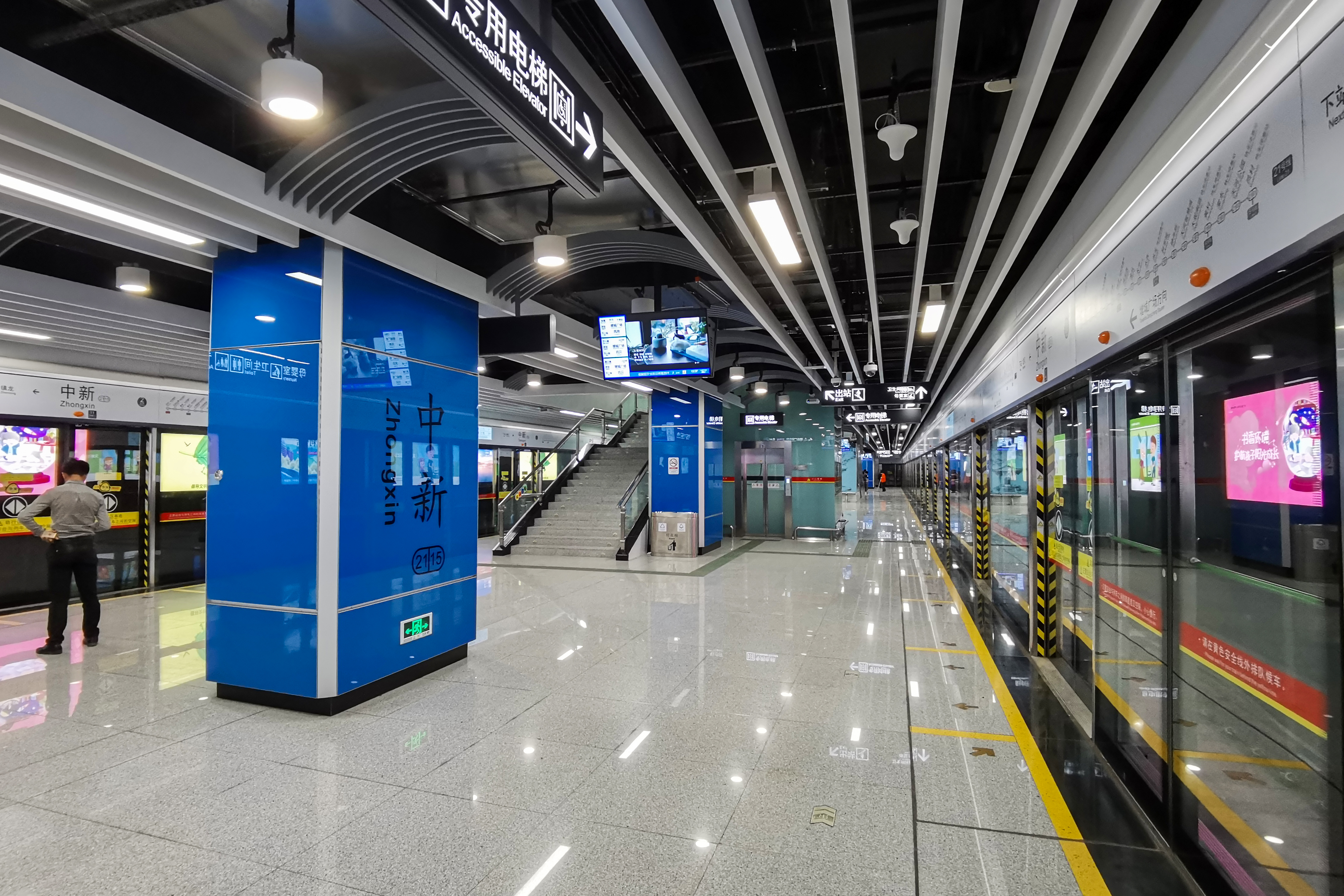 广州地铁中新站